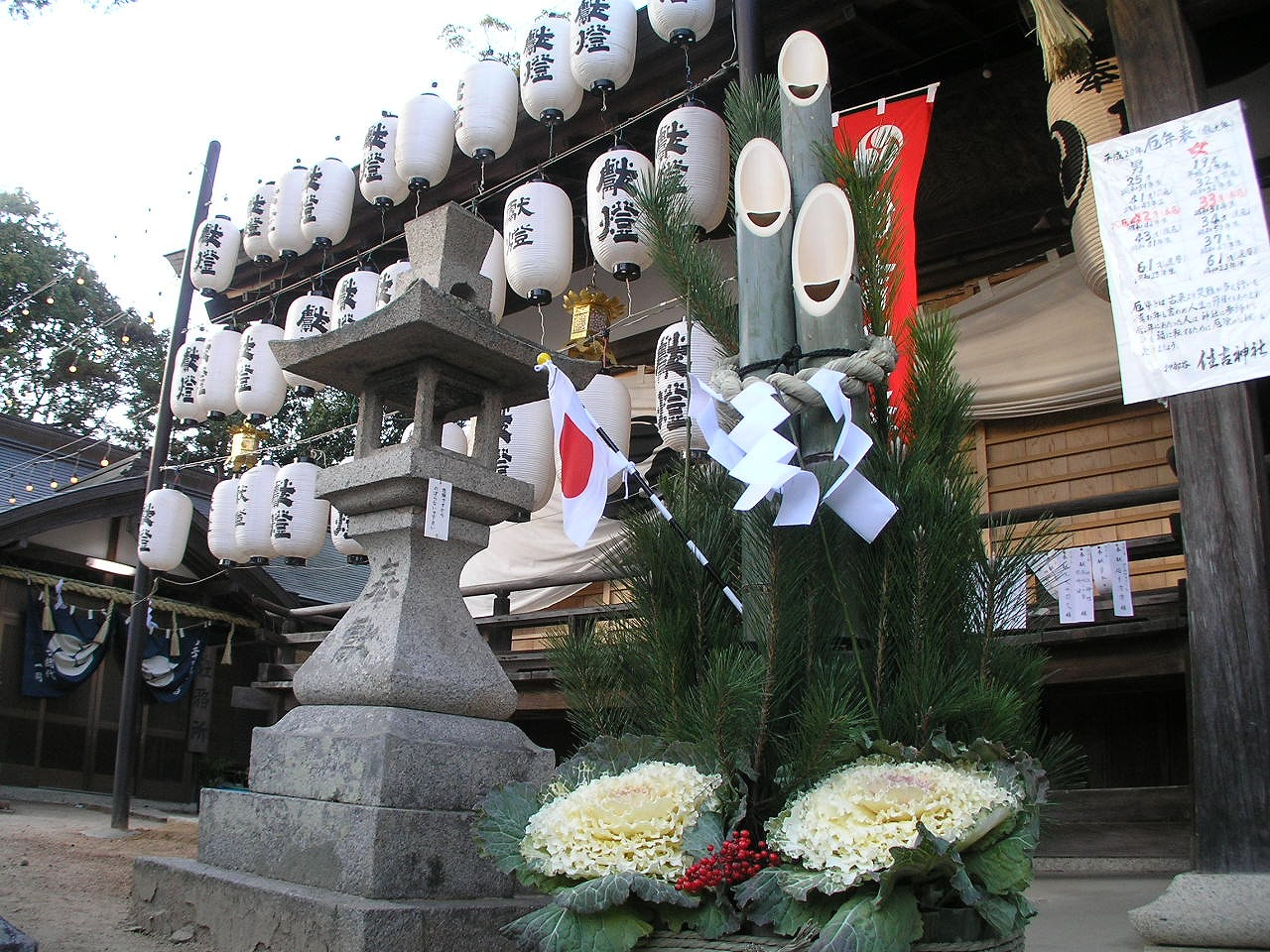 住吉神社 (神戸市西区)2008初詣 社殿 門松